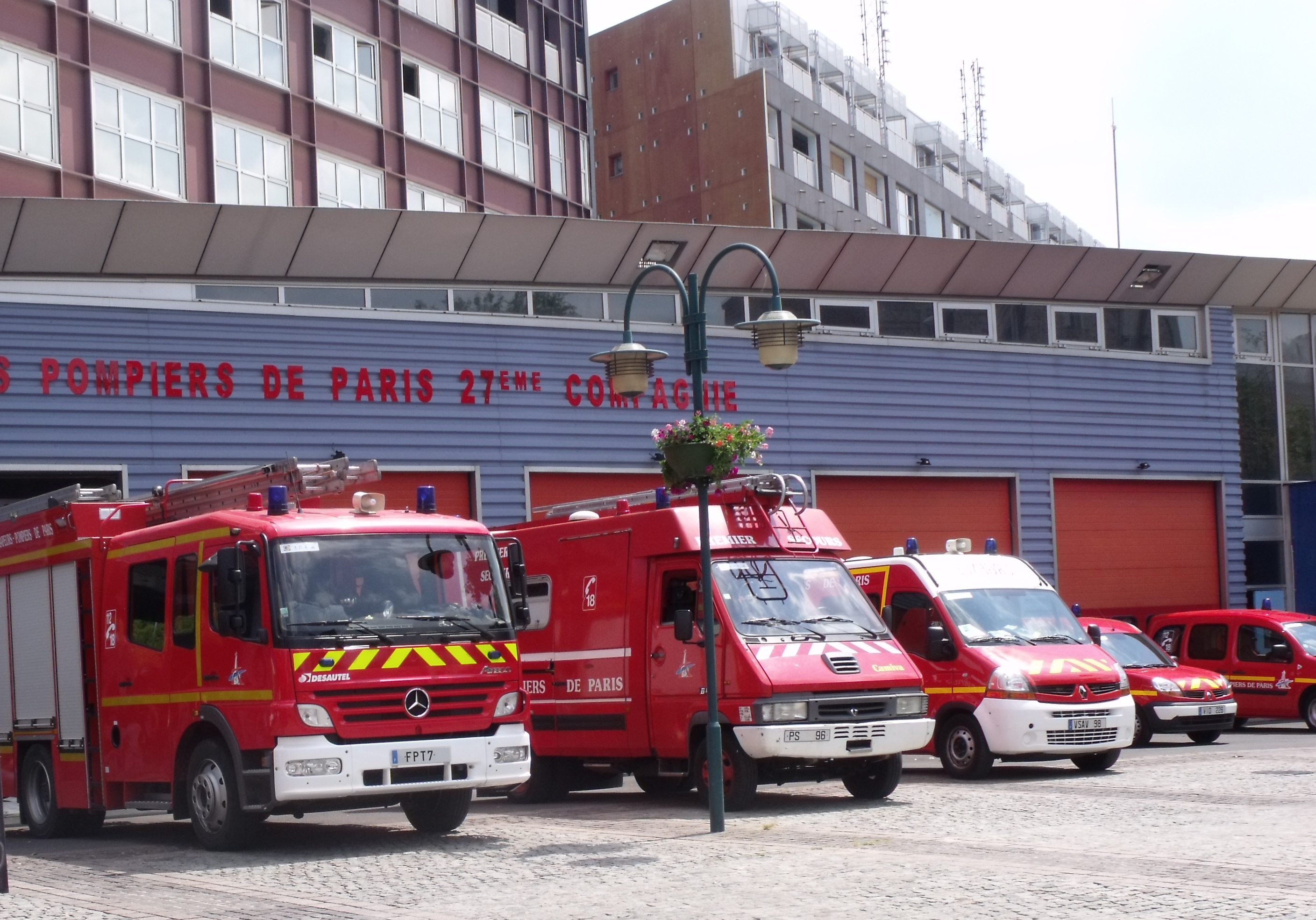 Centre de Secours Principal de Gennevilliers avec ses véhicules en juin 2011.